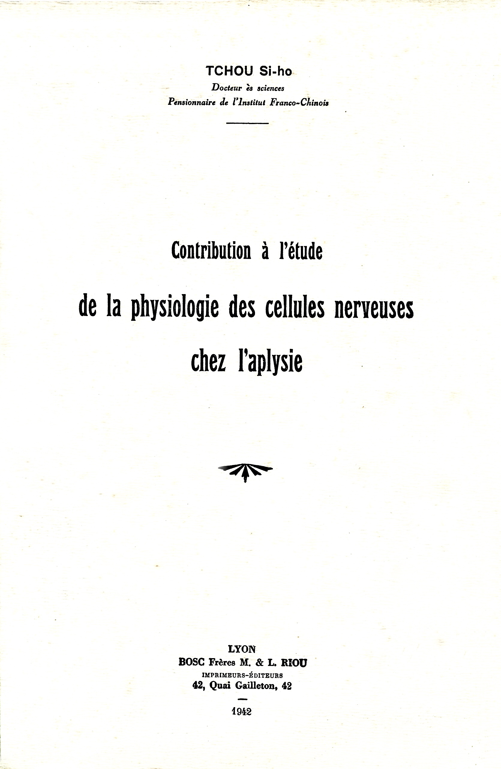 朱锡侯的博士论文封面